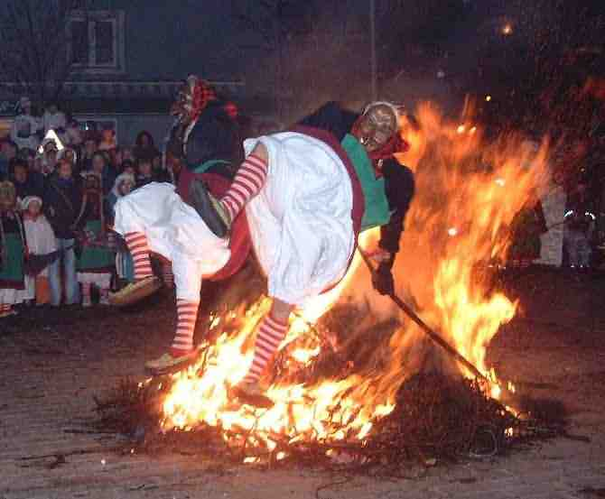 Hexensprung. Am Schmutzigen Donnerstag abends nach dem Hemdglunkerumzug wird der "letzte Meckerer" verbrannt, anschließend zeigen die Hexen gewagte Sprünge durch das Feuer.